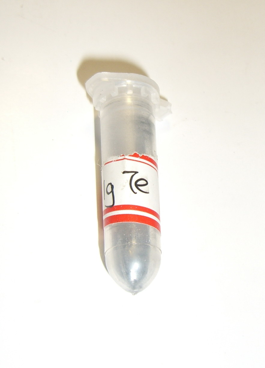 1g Tellurium